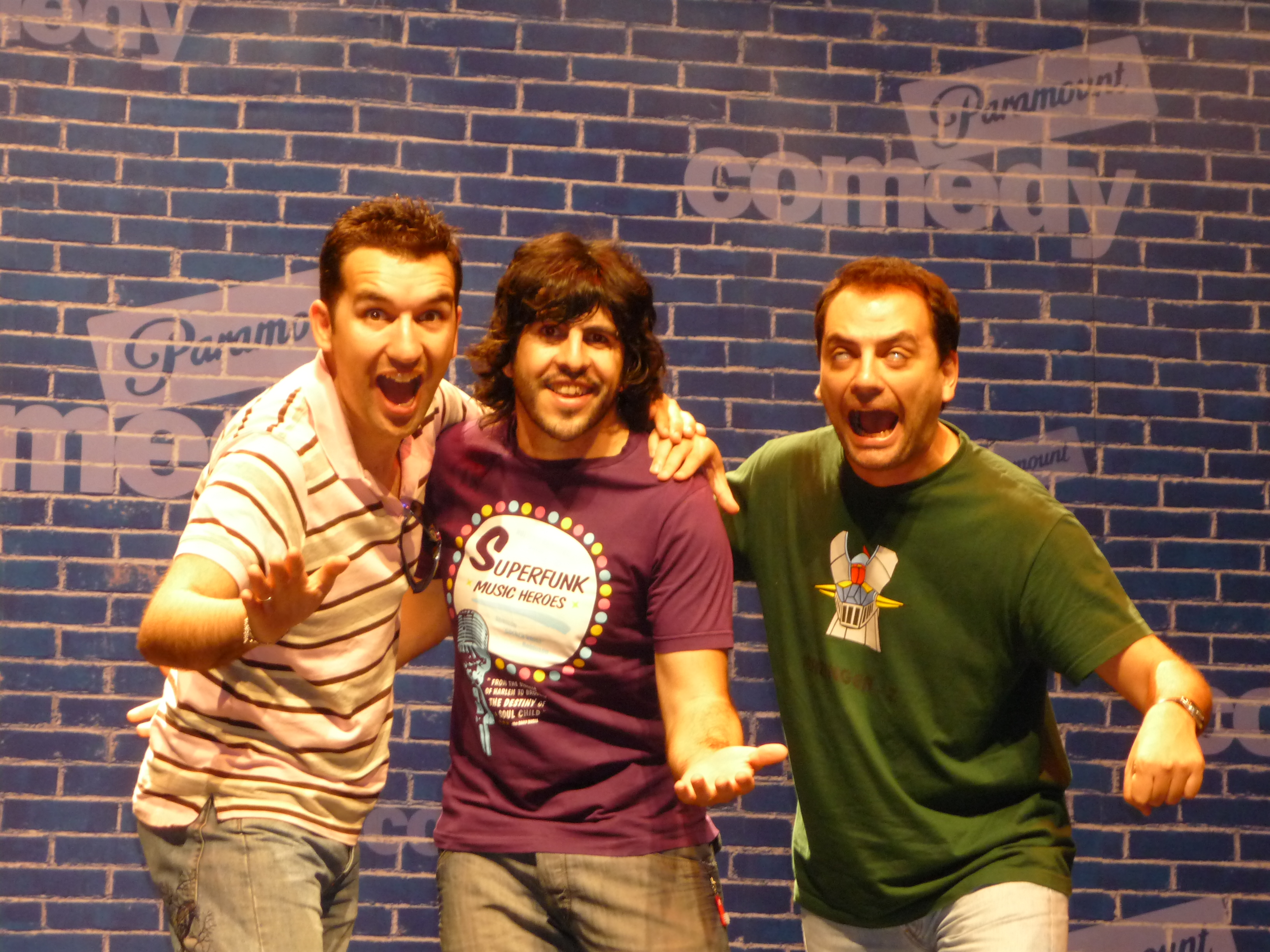 Juan Solo y sus amigos